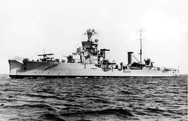 Incrociatore leggero Alberico da Barbiano, foto ufficiale